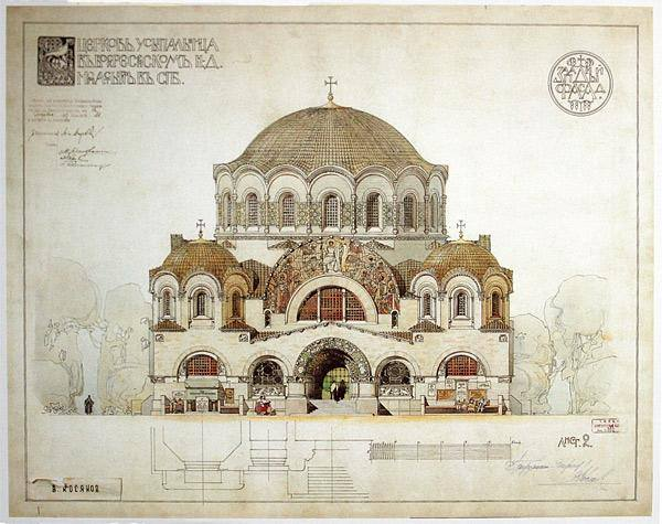 Церковь Казанской иконы Божией Матери. Западный фасад. Эскизный проект.